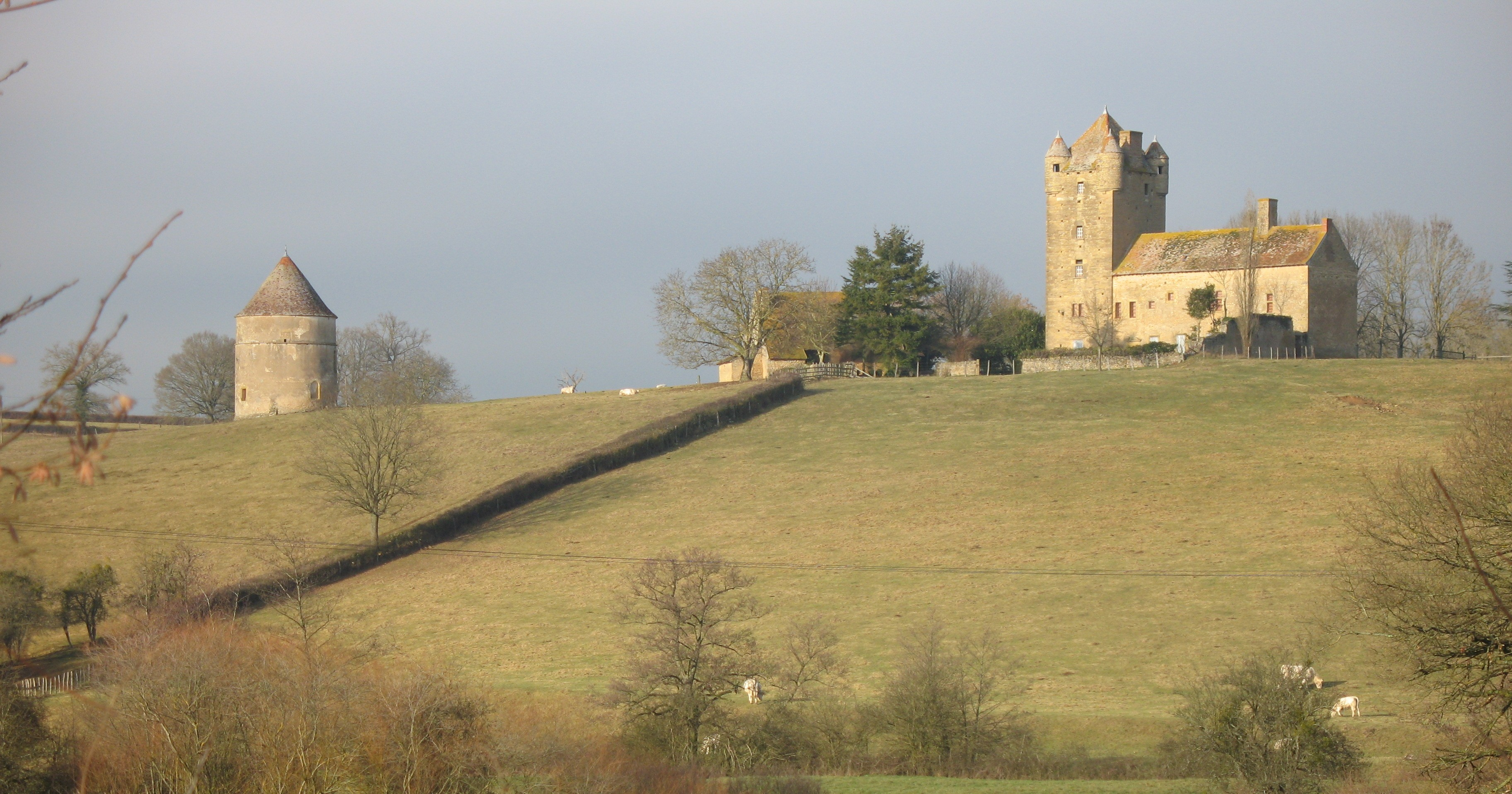 Château de Montessus - Changy (Saône-et-Loire)